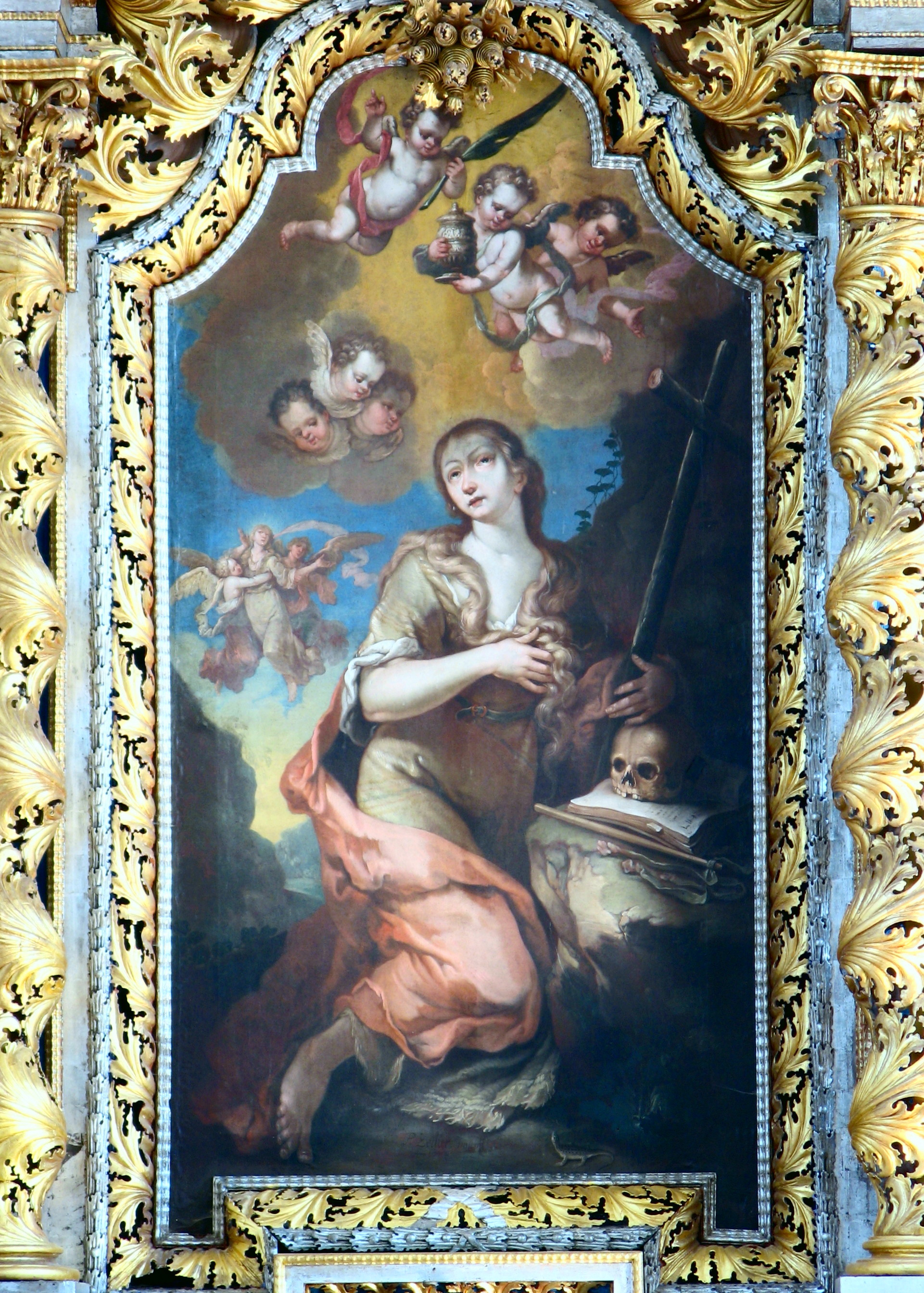 Altarblatt